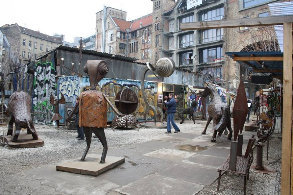 Skulpturen aus Metall im Garten des Künstlerhauses Tacheles, 2011